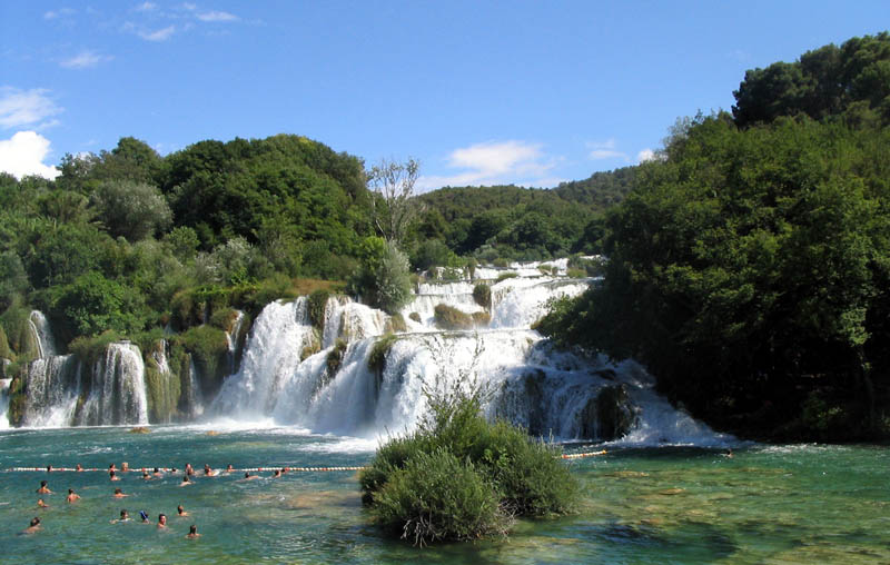 National park Krka